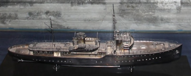 Oryginalny model okrętu „Pikker” w Eesti Meremuuseum.